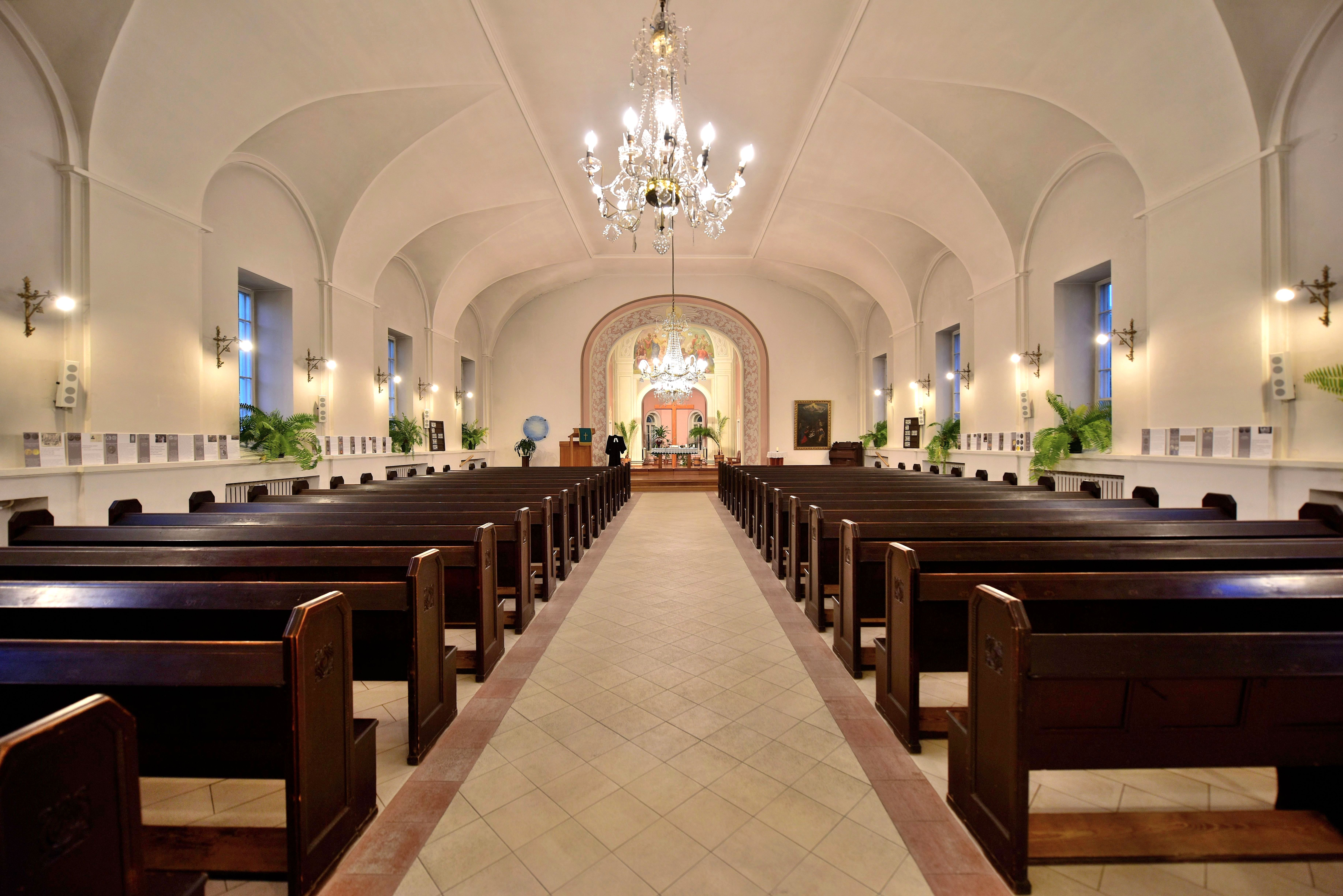 Wnętrze kościoła Wniebowstąpienia Pańskiego przy ul. Puławskiej 2a w Warszawie